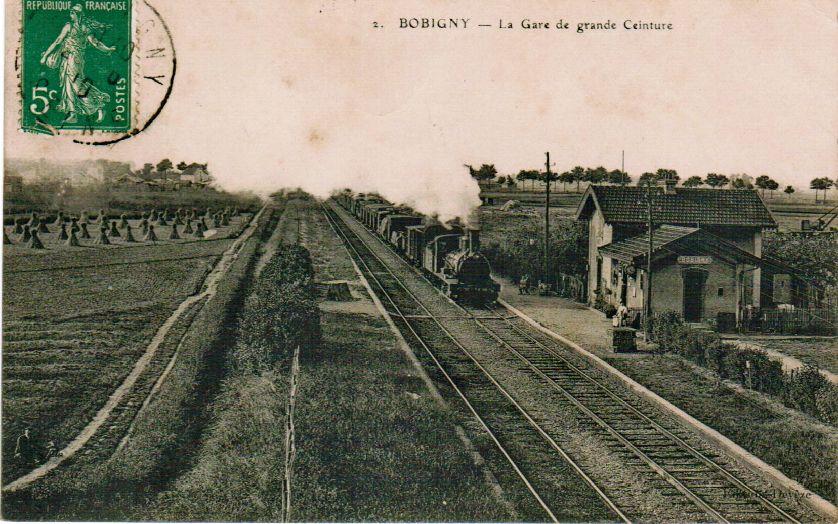 Carte postale ancienne éditée par Devèze, n°2 BOBIGNY - La Gare